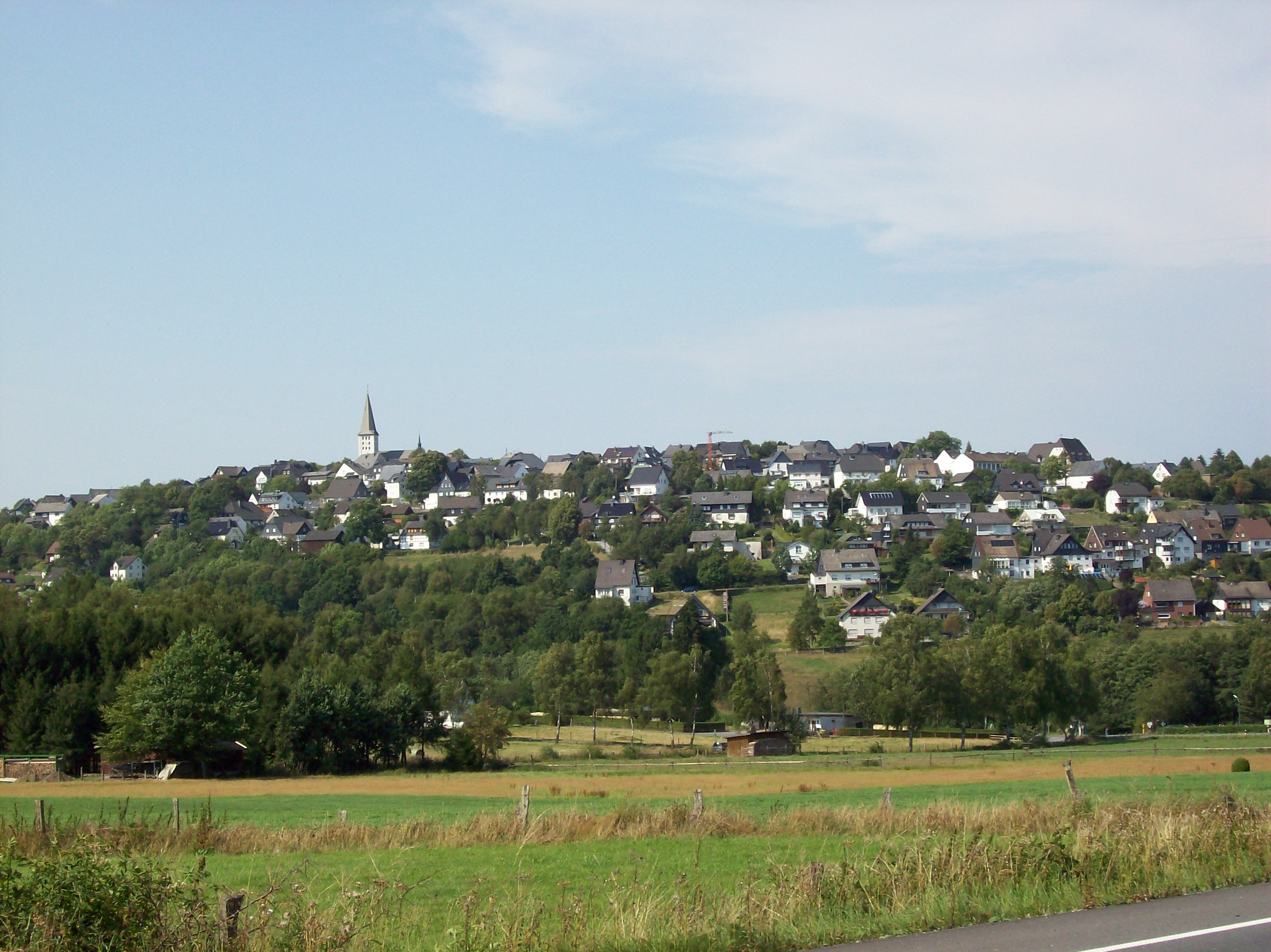 Warstein-Hirschberg (Germany)